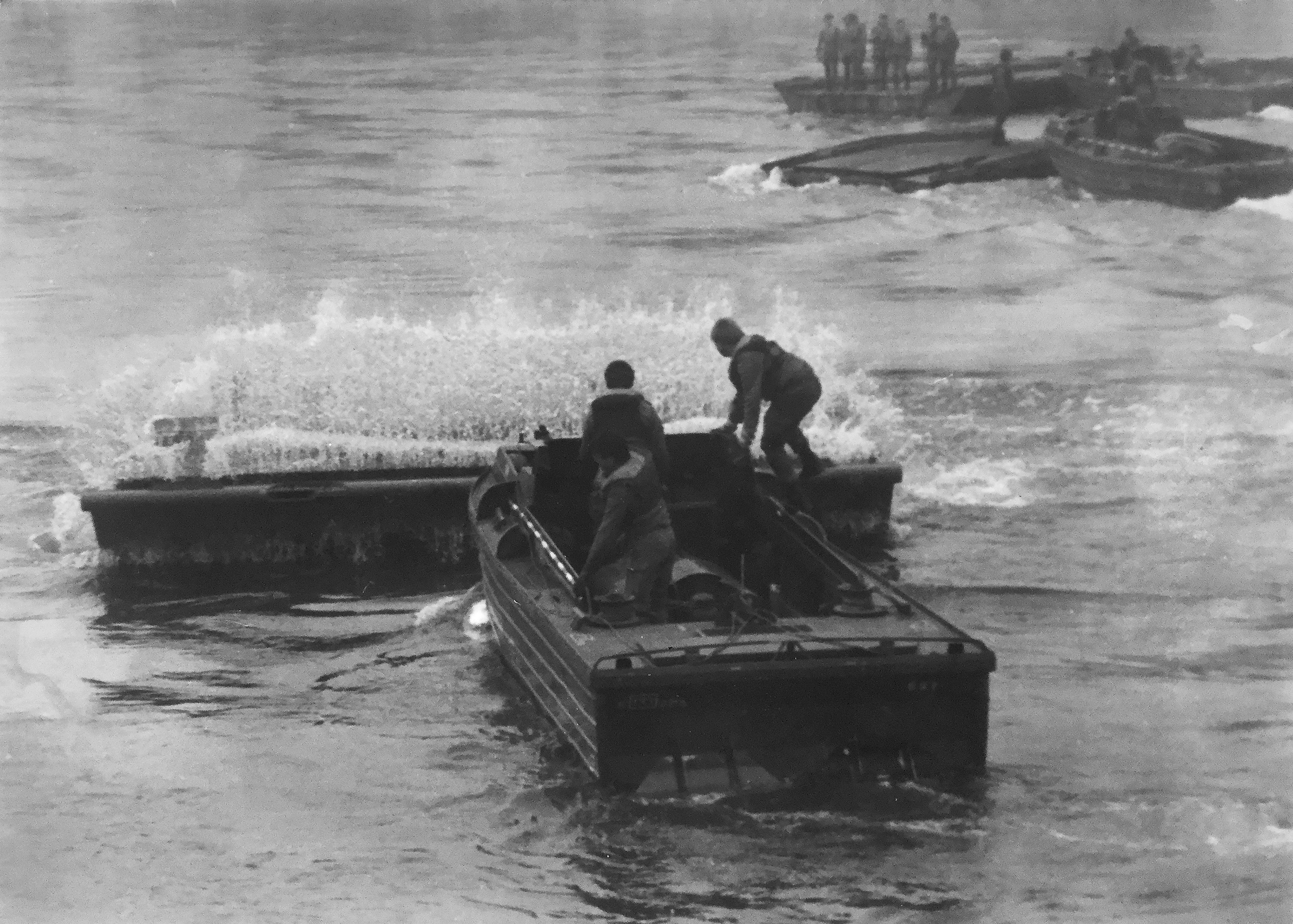 Faltschwimmbrücke der Bundeswehr 1983/84. PiBtl. 5/220L (Aufnehmen eines Innenabschnitts durch M-Boot. Im Hintergrund Rampenabschnitt und Teilfähre)